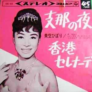 中文（台灣）: 在香港之唱片宣傳